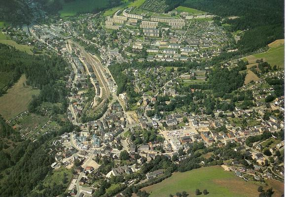 Luftaufnahme Stadtkern Klingenthal